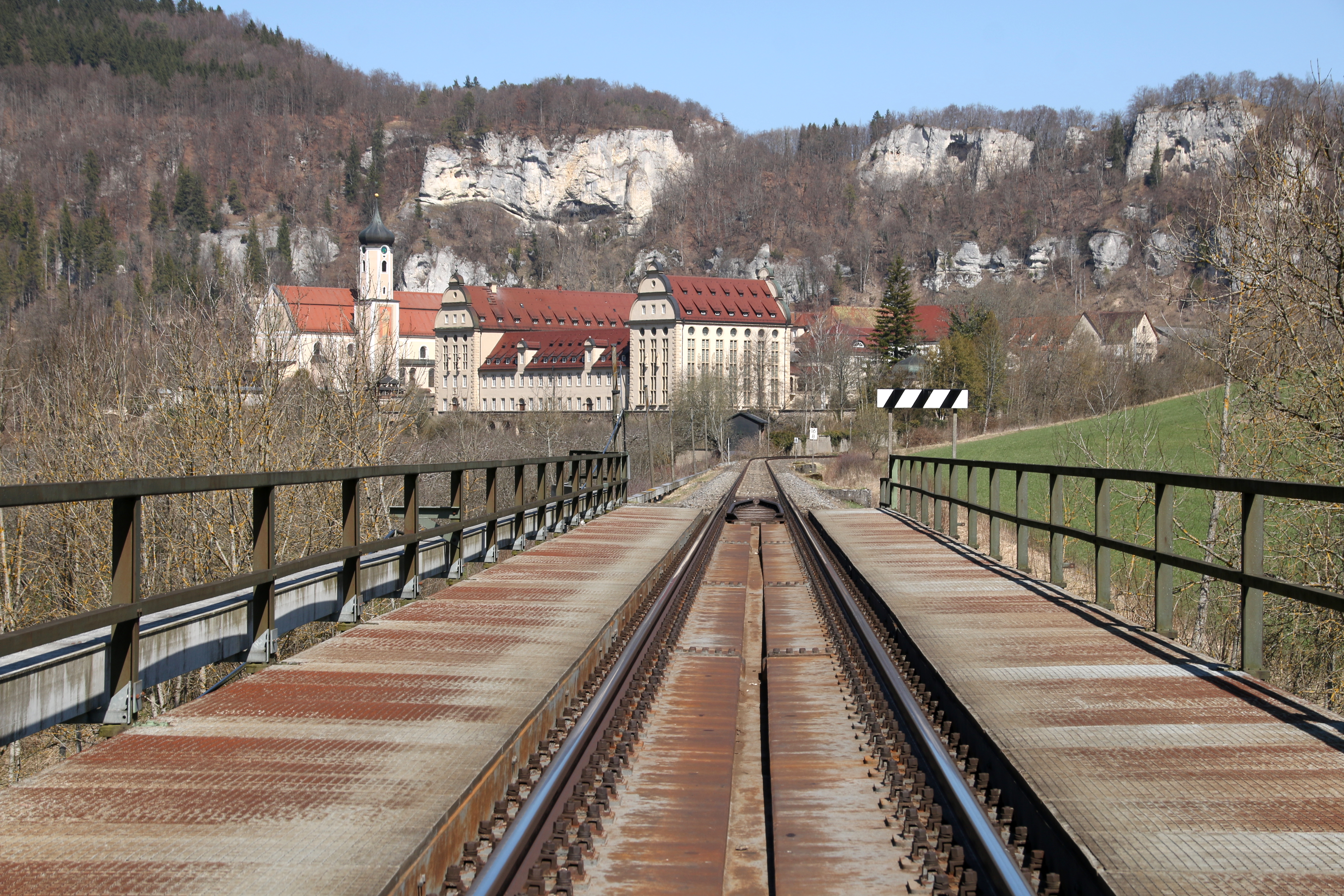 Donaueisenbahnbrücke mit Kloster Beuron (2018)